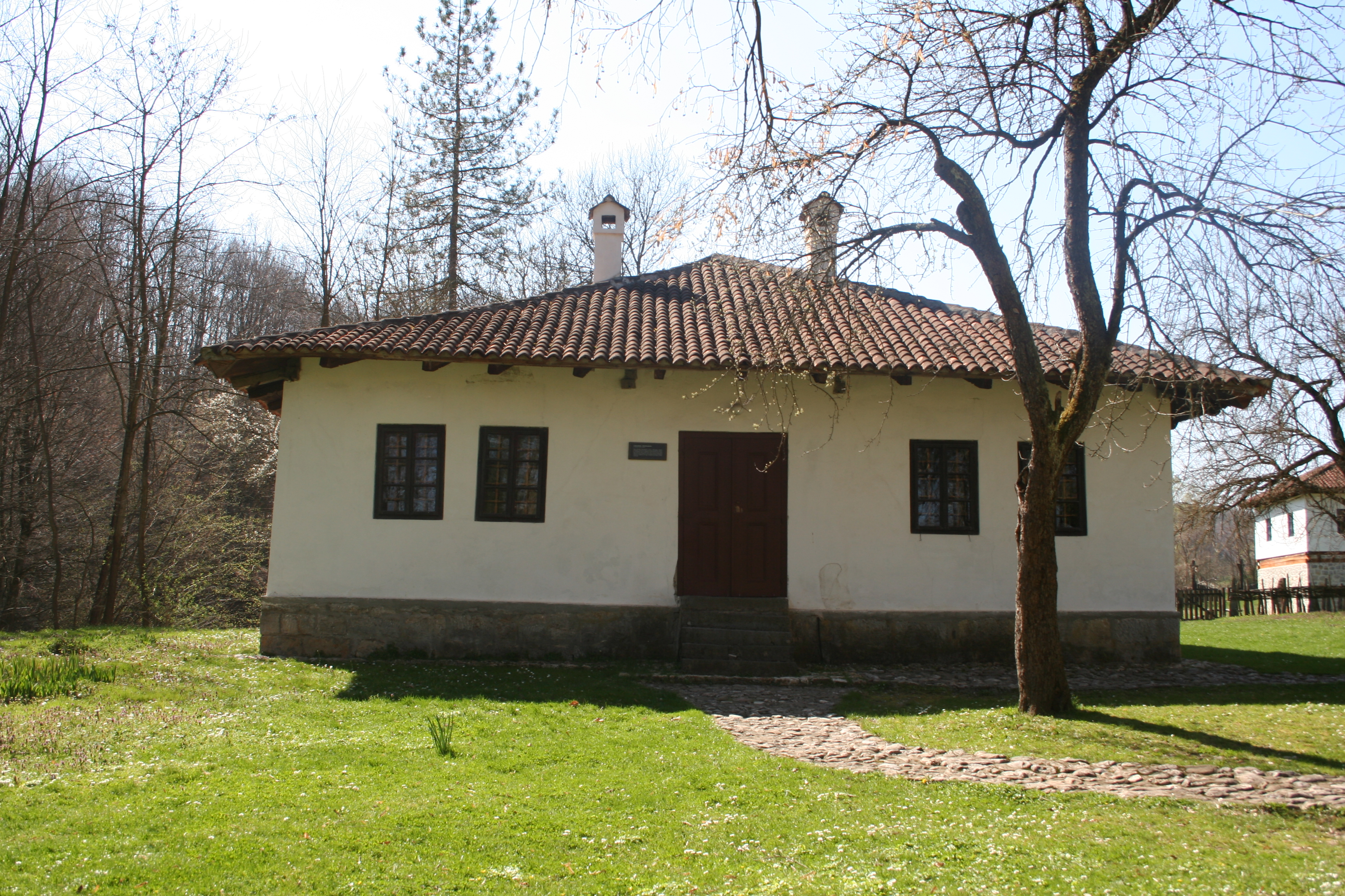 Stara škola, Brankovina